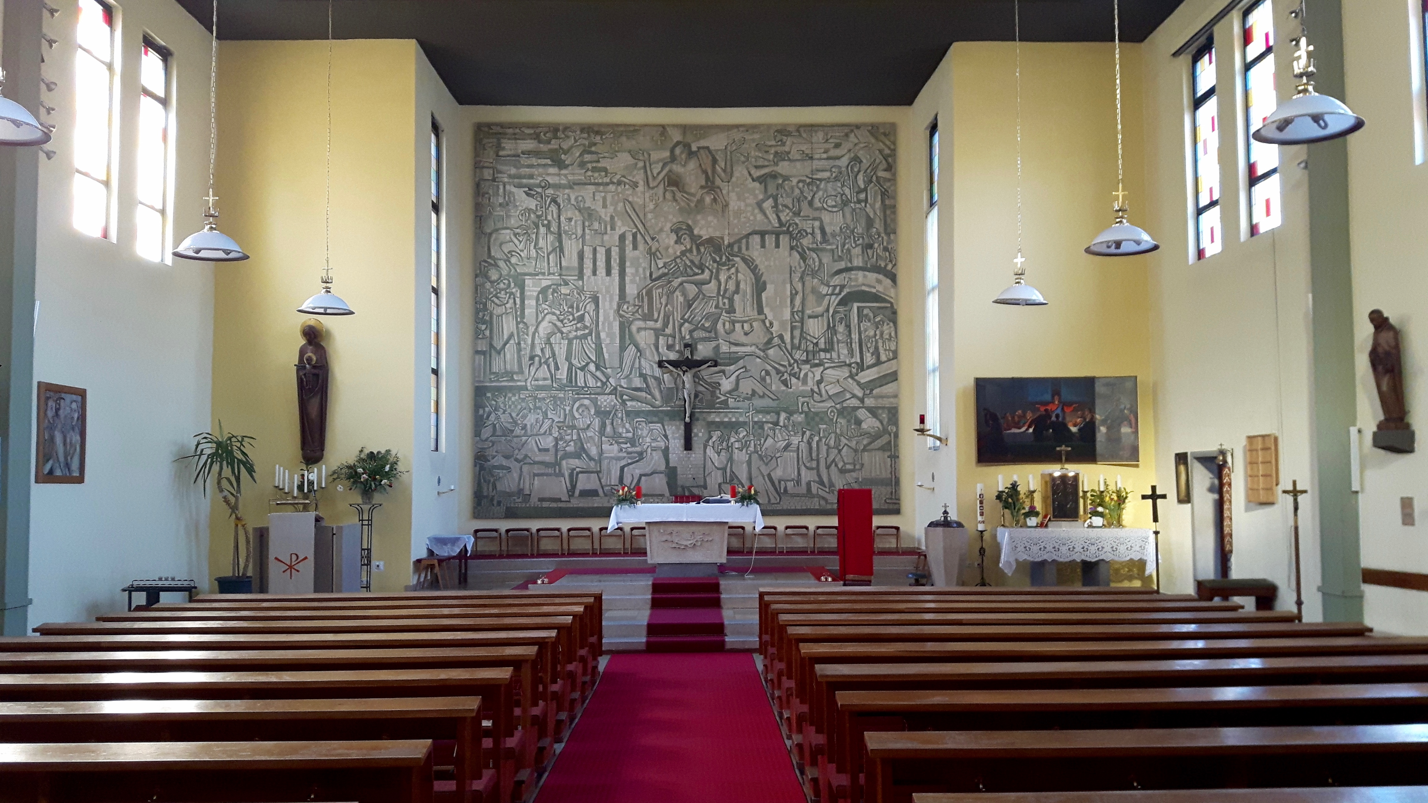 Innenraum der Pfarrkirche St. Martin in Wien-Siebenhirten.